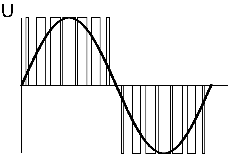 Pulsweitenmodulation zur Erzeugung einer sinusförmigen Spannung